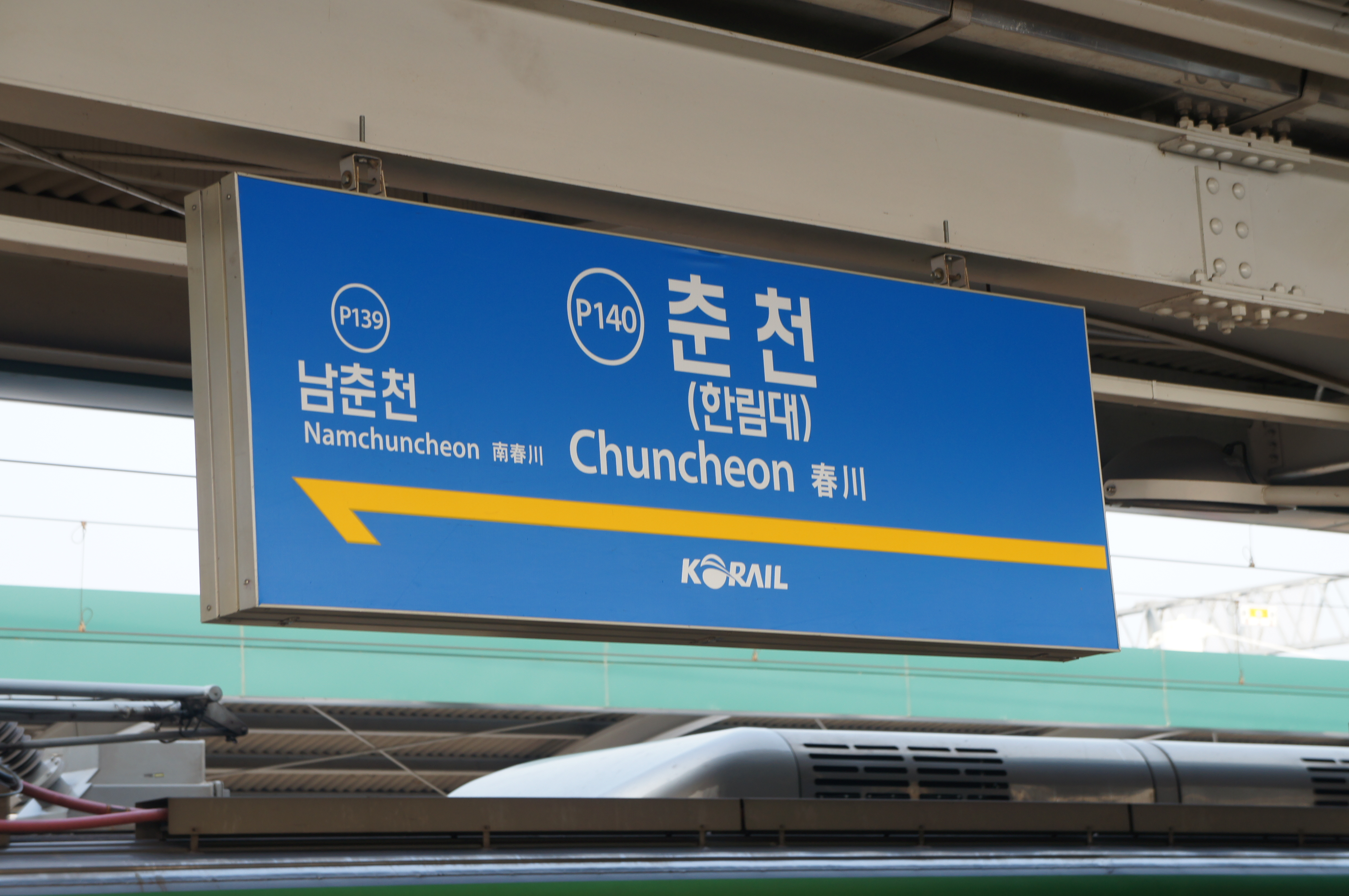 춘천역 역명판